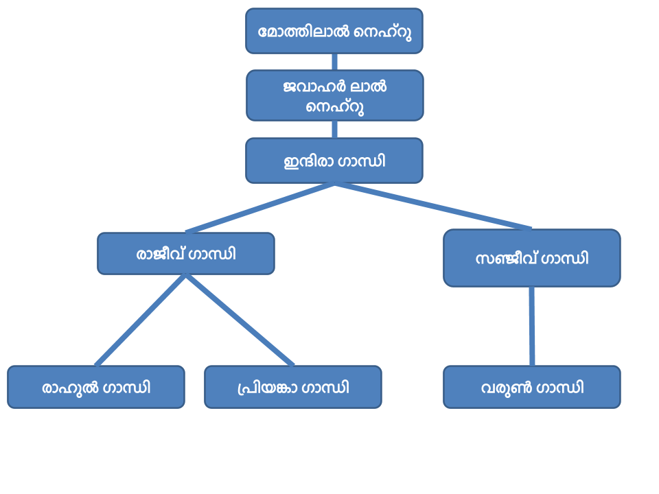 ഫാമിലി ട്രീ, ട്രീ എന്ന ആശയത്തിന് നല്ല ഒരു ഉദാഹരണമാണ്